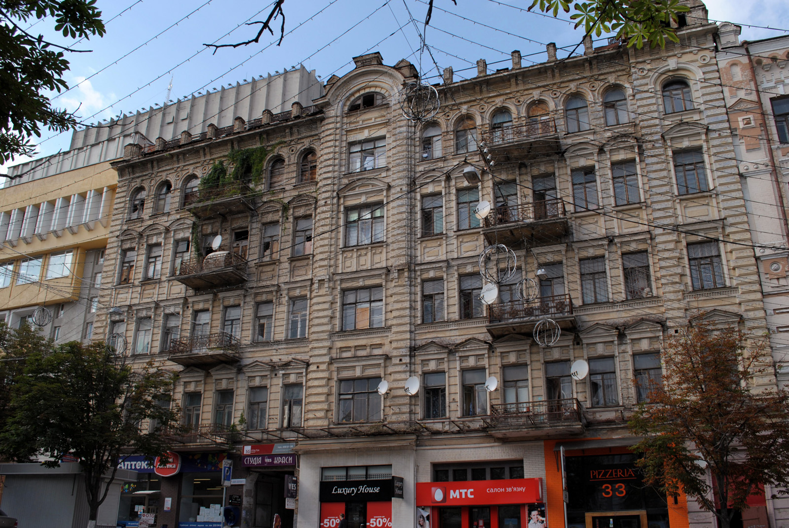 Будинок прибутковий, Київ, Хмельницького Богдана вул., 12-14